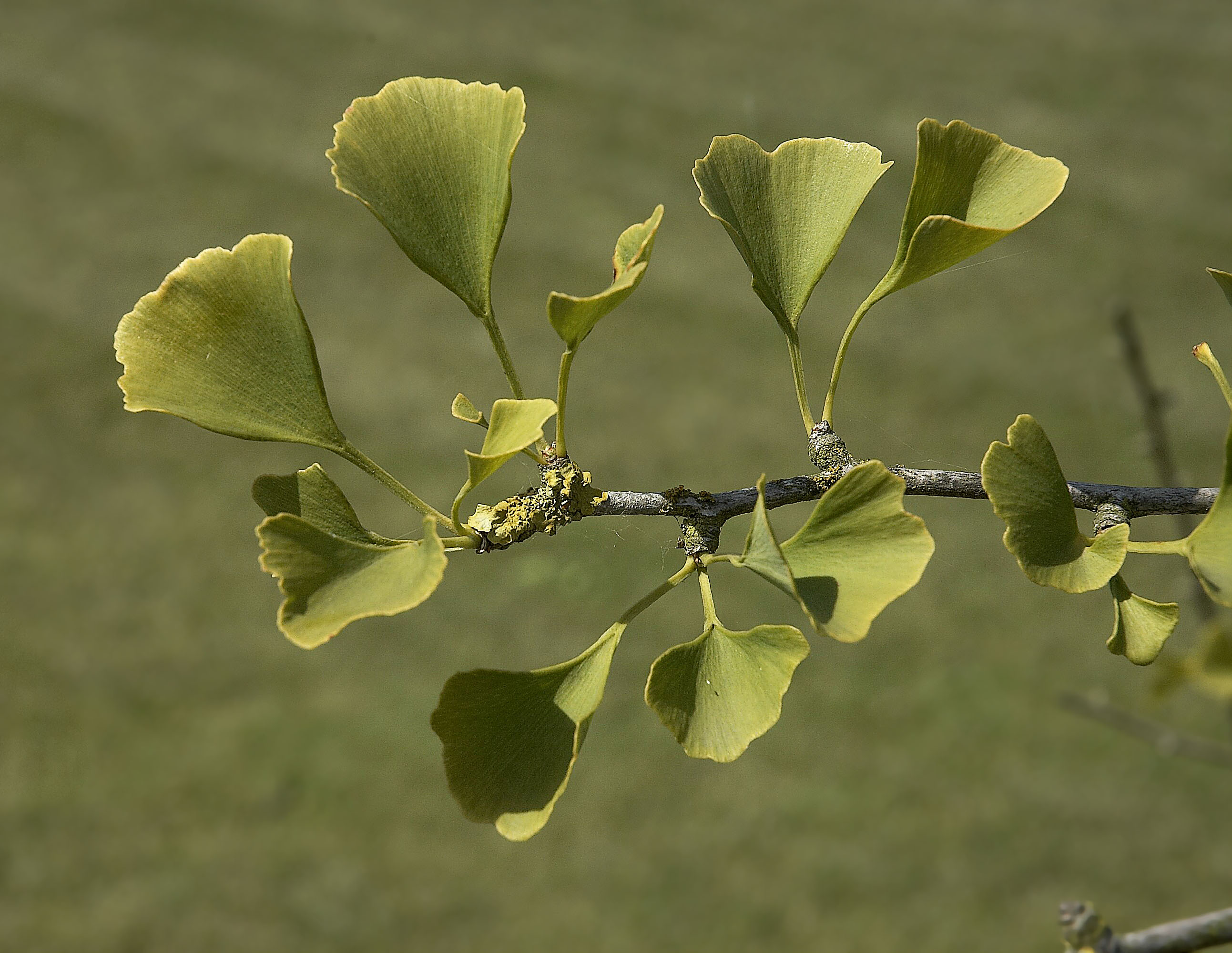 Ginkgo biloba leaves